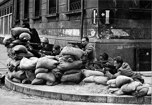 Combattenti del CLN a Milano il 26 aprile 1945.